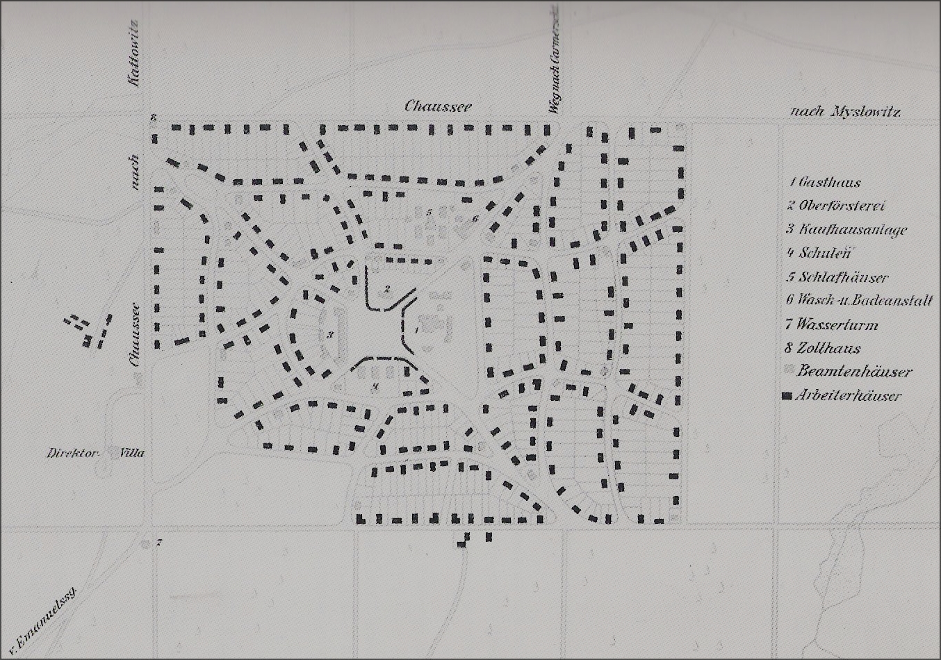 Giszowiec plan sytuacyjny z 1910 roku